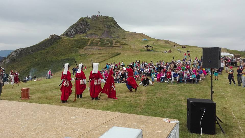 460. výročie od dobitia hradu Kamenica